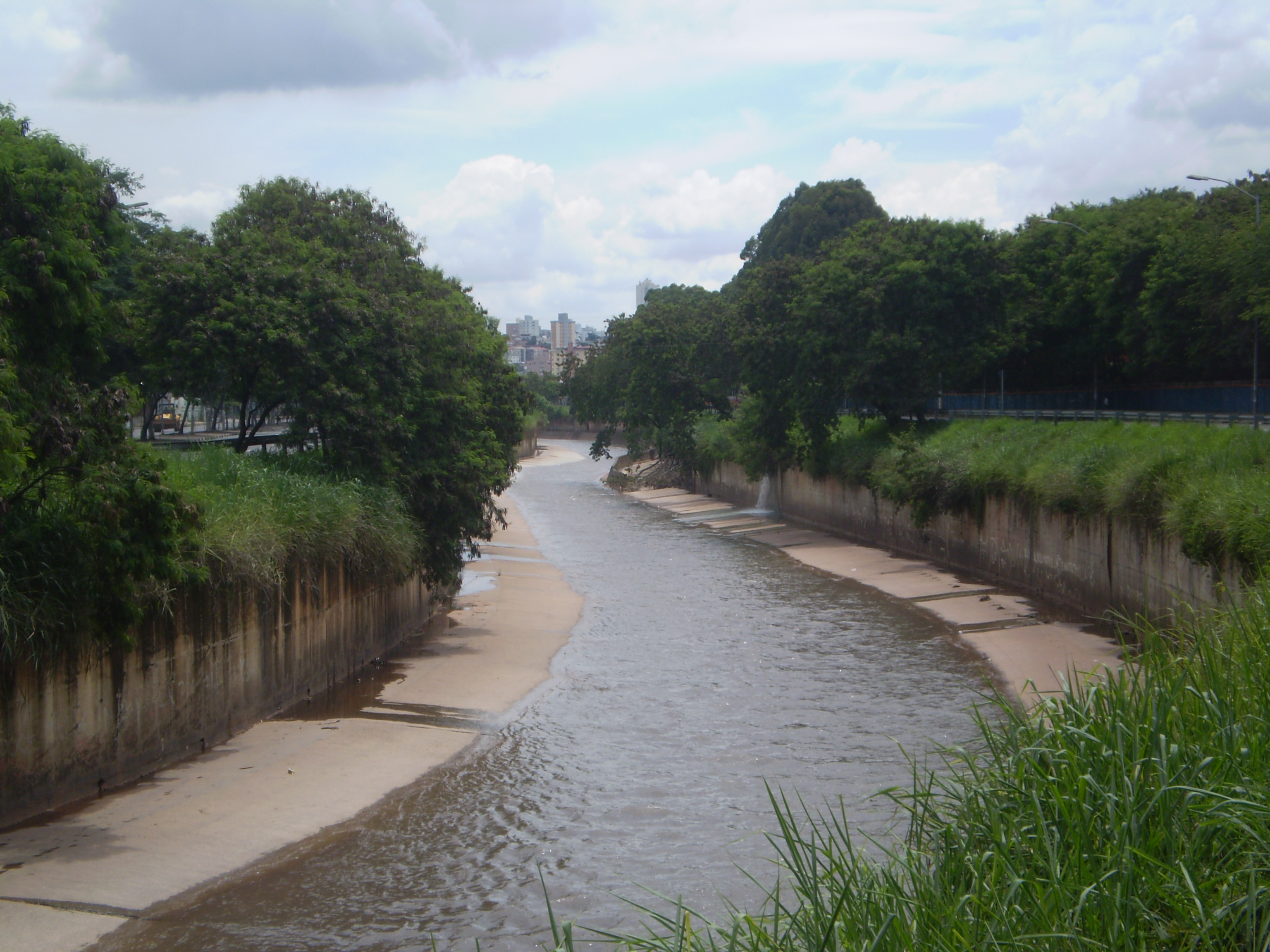 Ribeirão Arrudas, entre os bairros São Geraldo e Esplanada, Belo Horizonte, Minas Gerais, Brasil